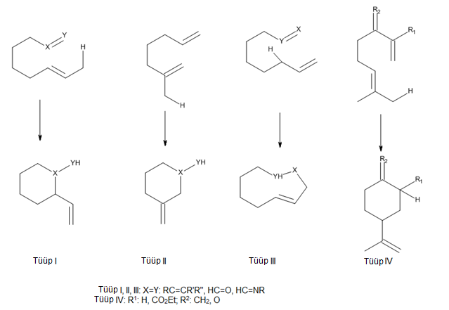 Intramolekulaarsete een-reaktsioonide tüübid